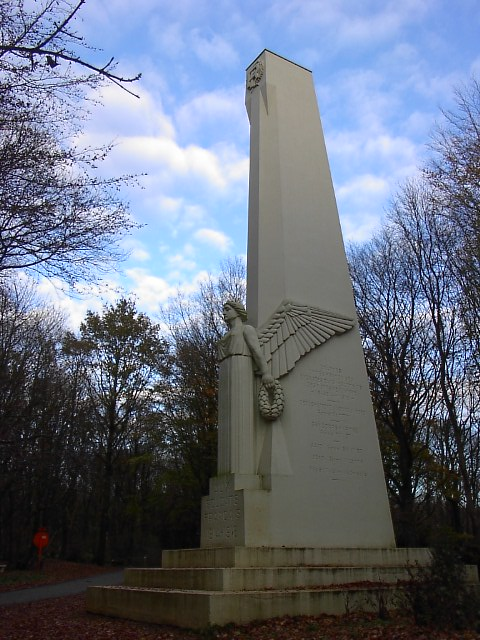 Monument Aux Soldats Francais (Kemmel)